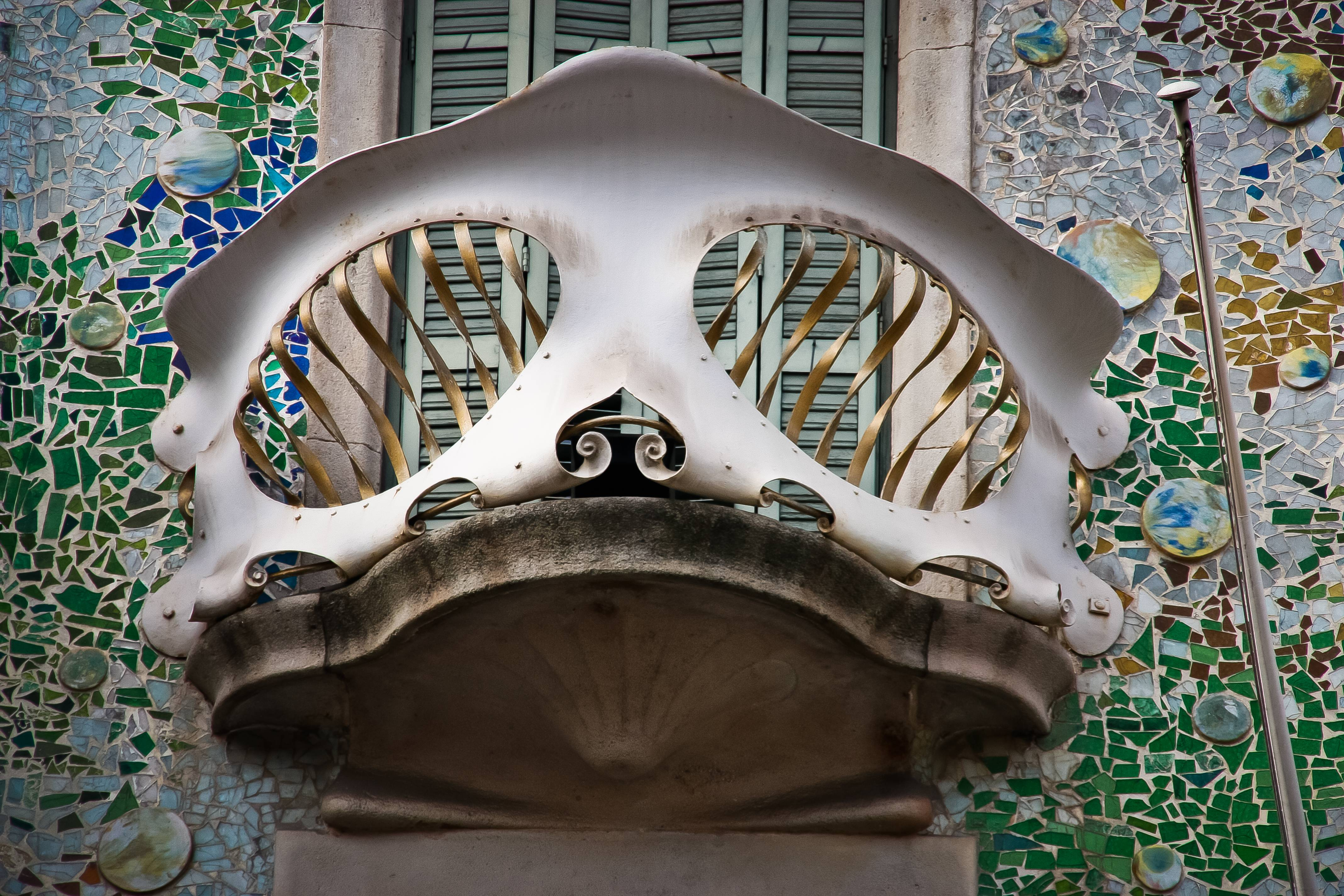 Casa Batlló